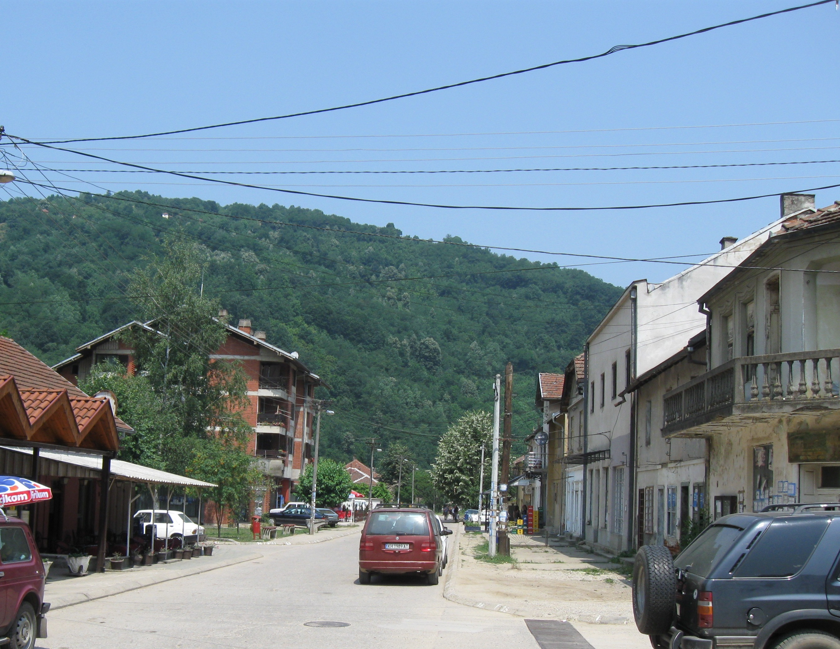 Snimak: Radosav Stojanovic